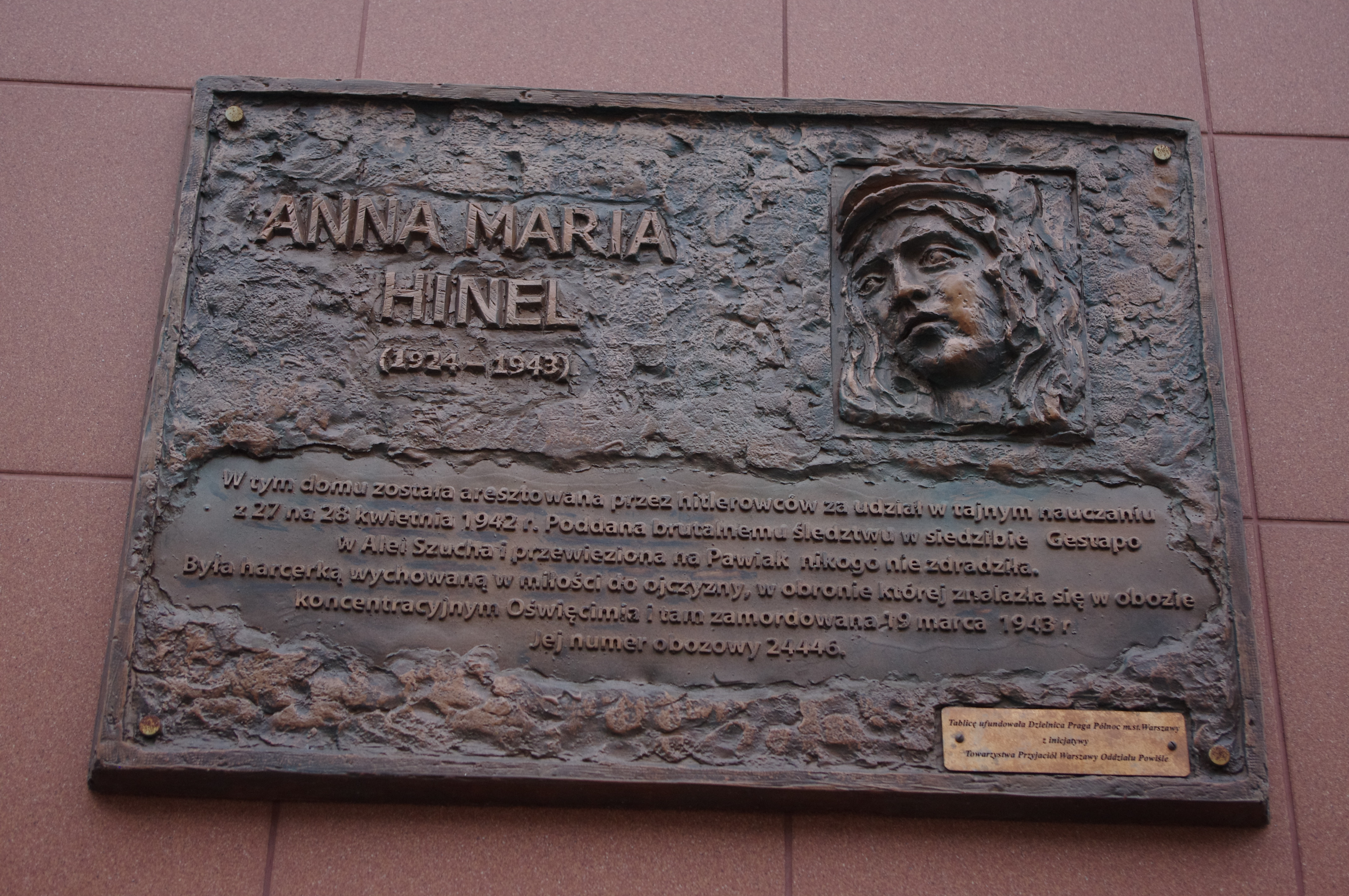 Tablica upamiętniająca Annę Marię Hinel na budynku przy ul. Floriańskiej 8 w Warszawie